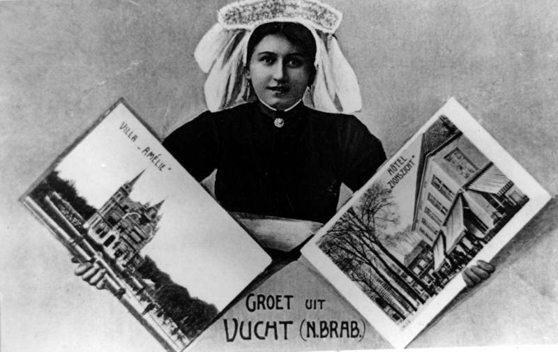 Een groetenkaart van Vught, uit 1902. Vught werd toen nog geschreven met CH.